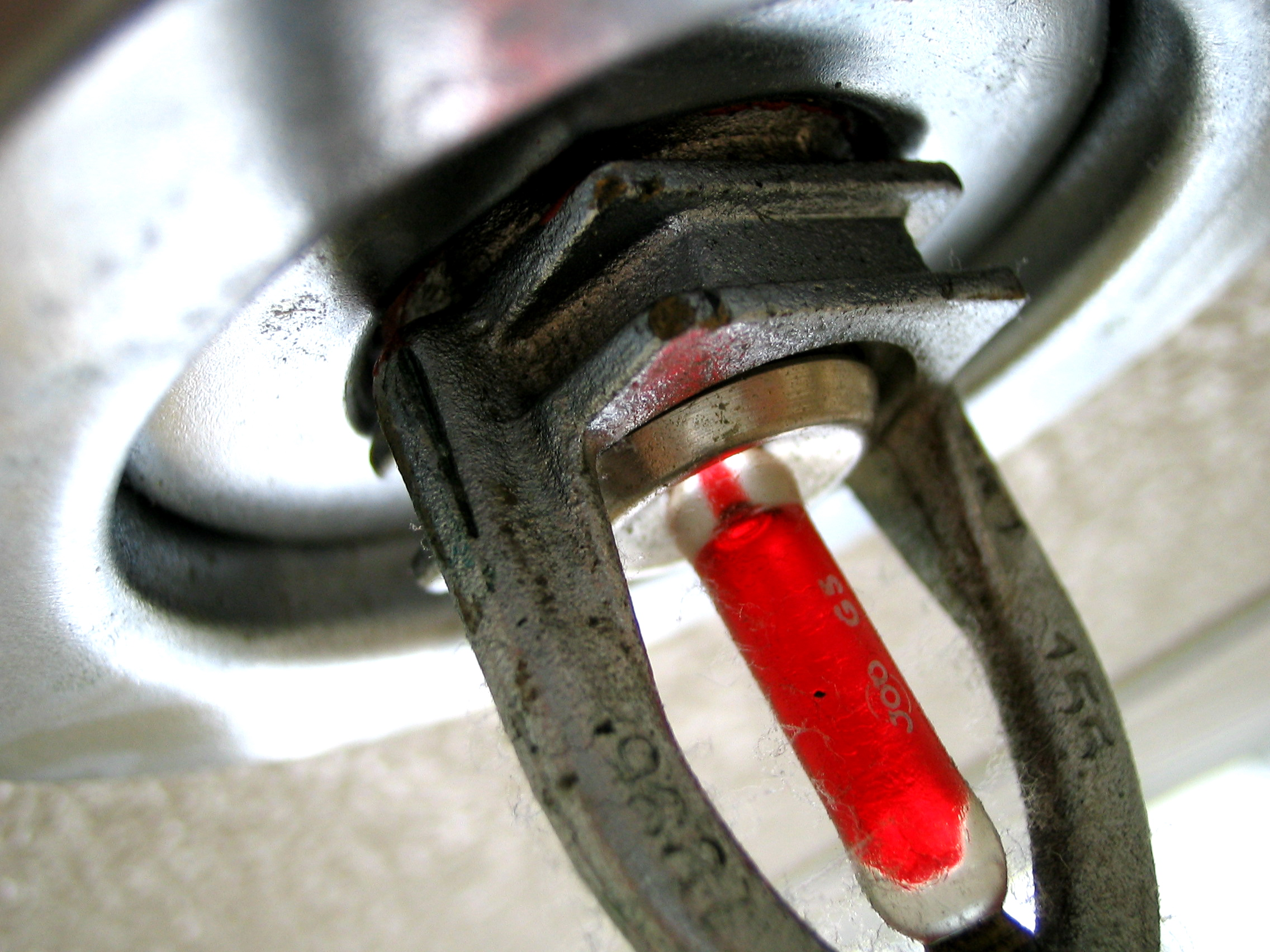 Detail of a sprinkler.